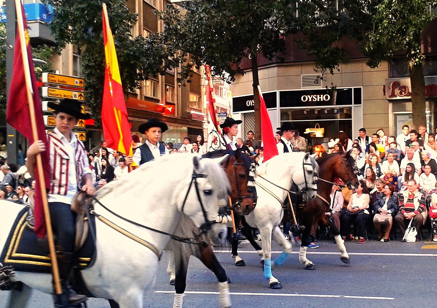 Banderas, Bando de la Huerta (Murcia)